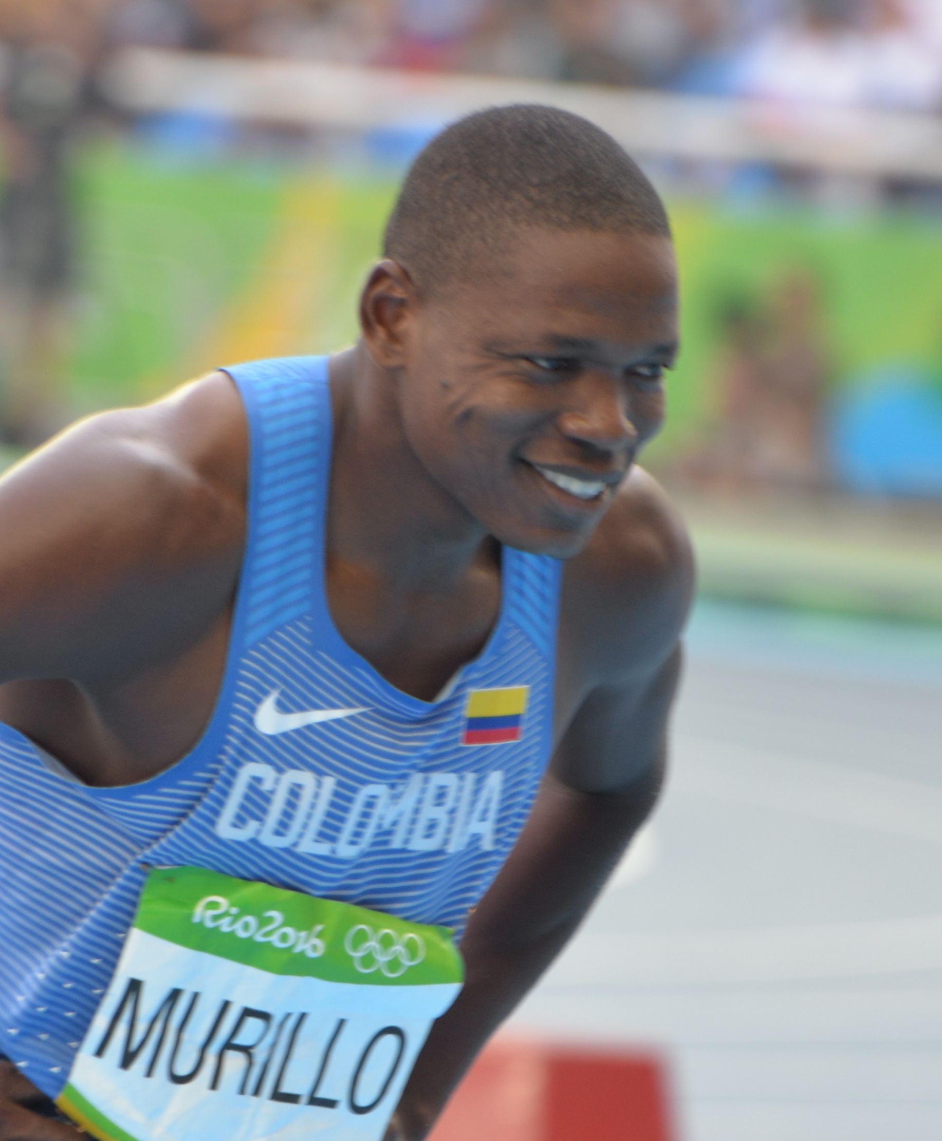 Le sauteur colombien John Murillo dans la finale du triple saut aux jeux olympique à Rio en 2016